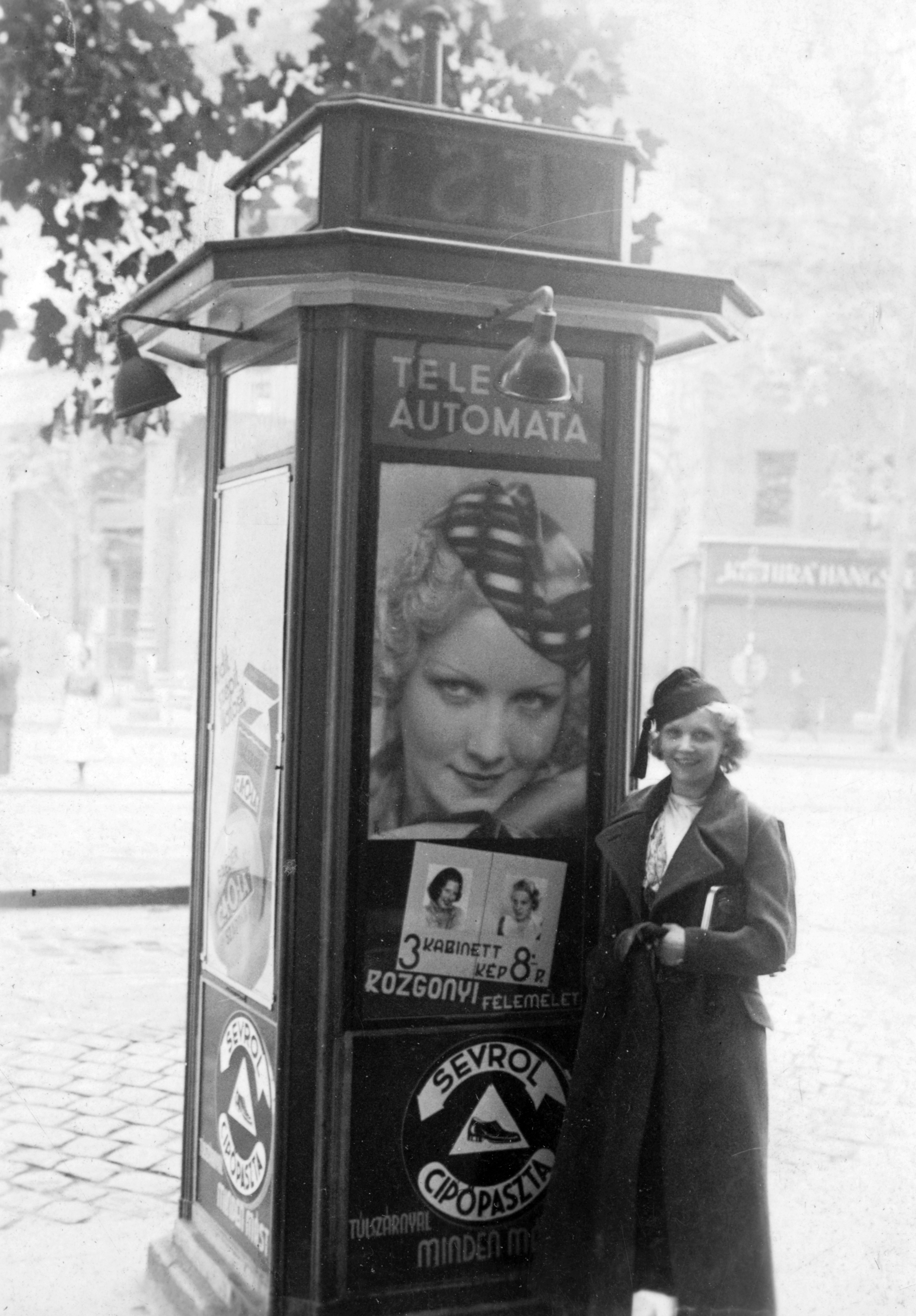 Telefonfülke a Kálvin tér 5. előtt. Goll Bea színésznő saját reklámfotója mellett. Location: Hungary, Budapest V. Tags: ad pillar, telephone, ad, actor, poster, Budapest Title: Telefonfülke a Kálvin tér 5. előtt. Goll Bea színésznő saját reklámfotója mellett.